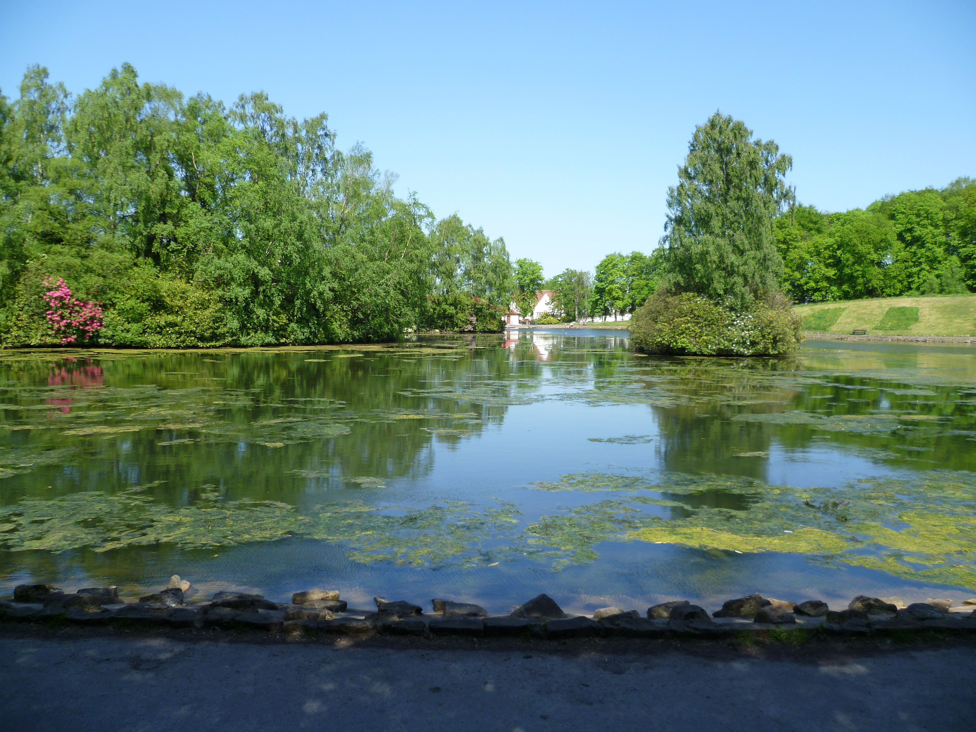 Gàidhlig: Lochan Ghleann Rouken (Siorrachd Rinn Friù an Ear), Cèitean 2012.